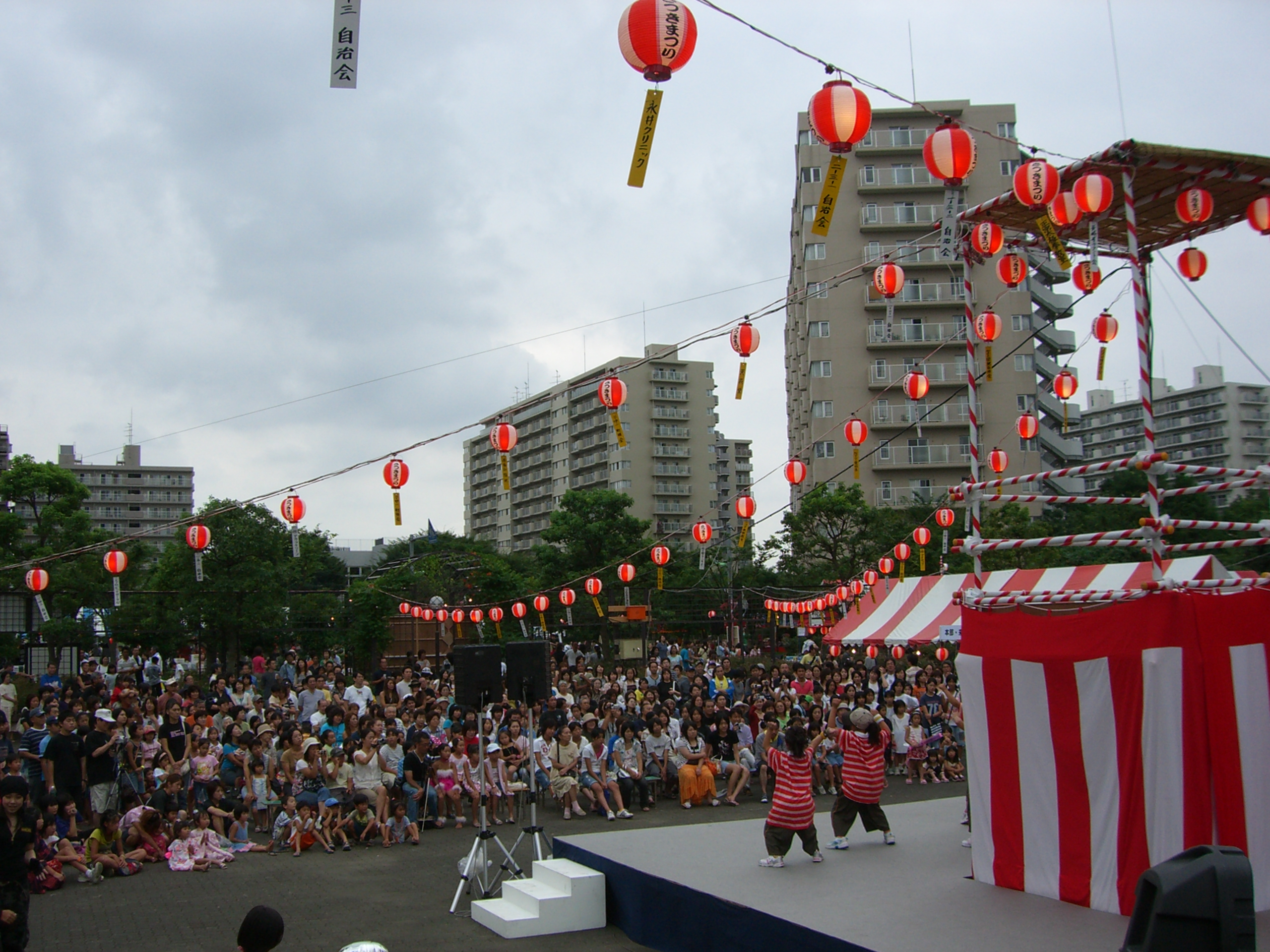 さつき祭りの模様 ダンス発表